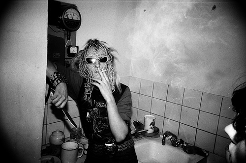 Москва 1985. Кисс, группа Коррозия Металла.